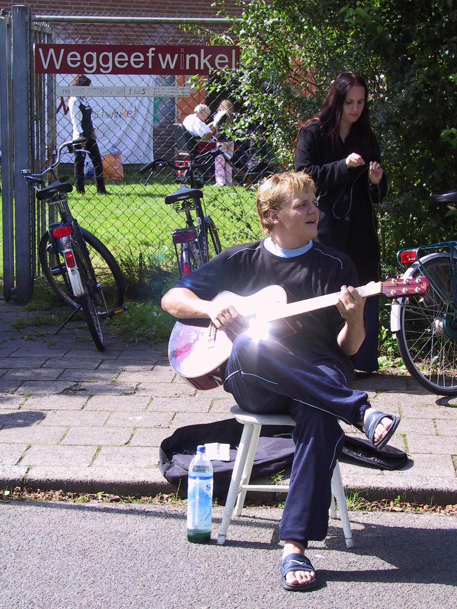 Weggeefwinkel, waarschijnlijk Amersfoort, en straatmuzikant freeshop umsonstladen magasin gratuit